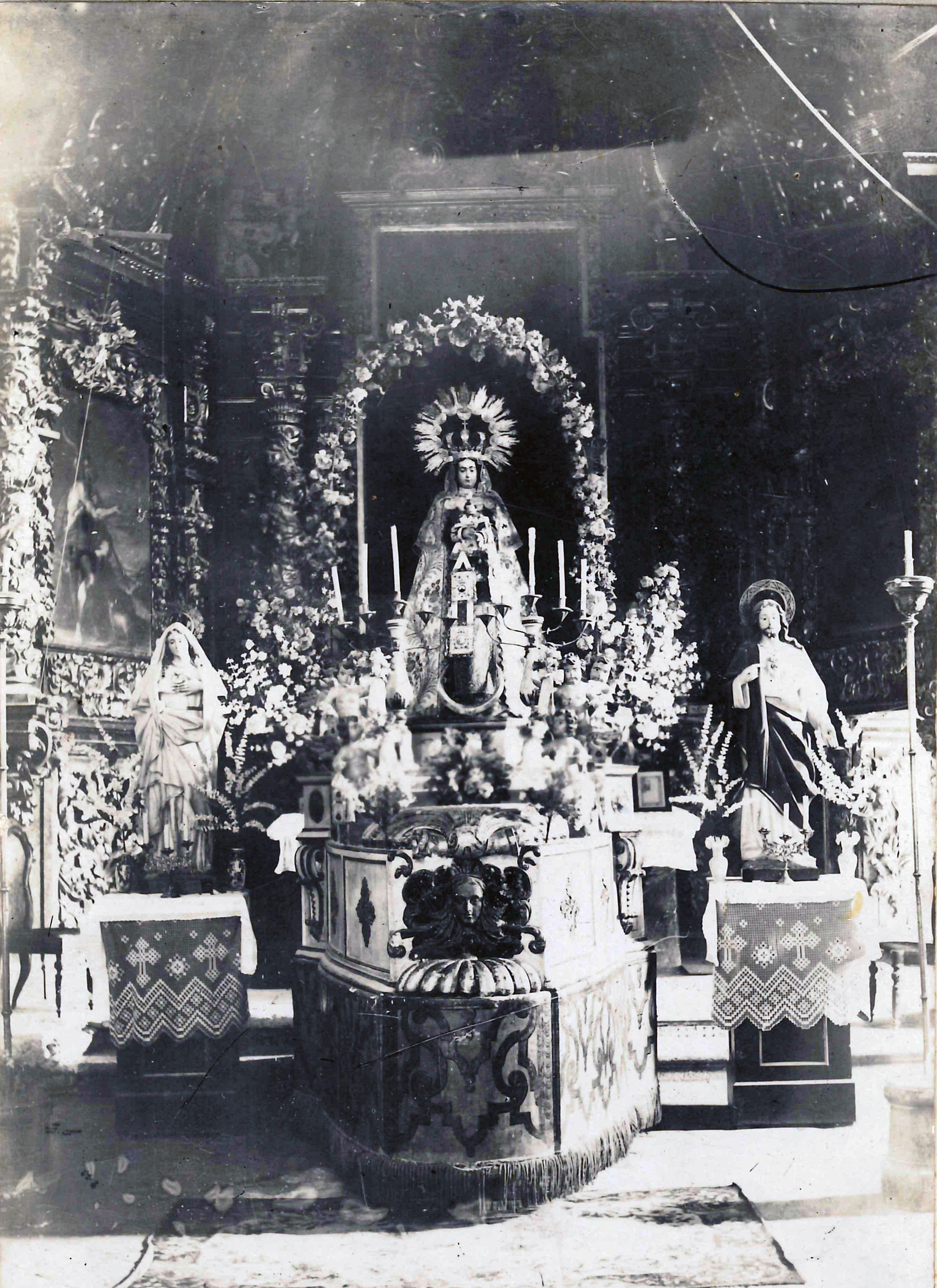 En primer plano imagen de la Virgen del Carmen sobre su carroza flanqueda por las exculturas del Corazón de María y de Jesús. Al fondo, el retablo barroco concertado en 1698 con José Machín.